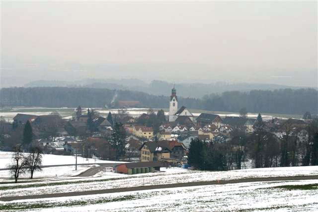 Boiel, Aargau, Schwiiz